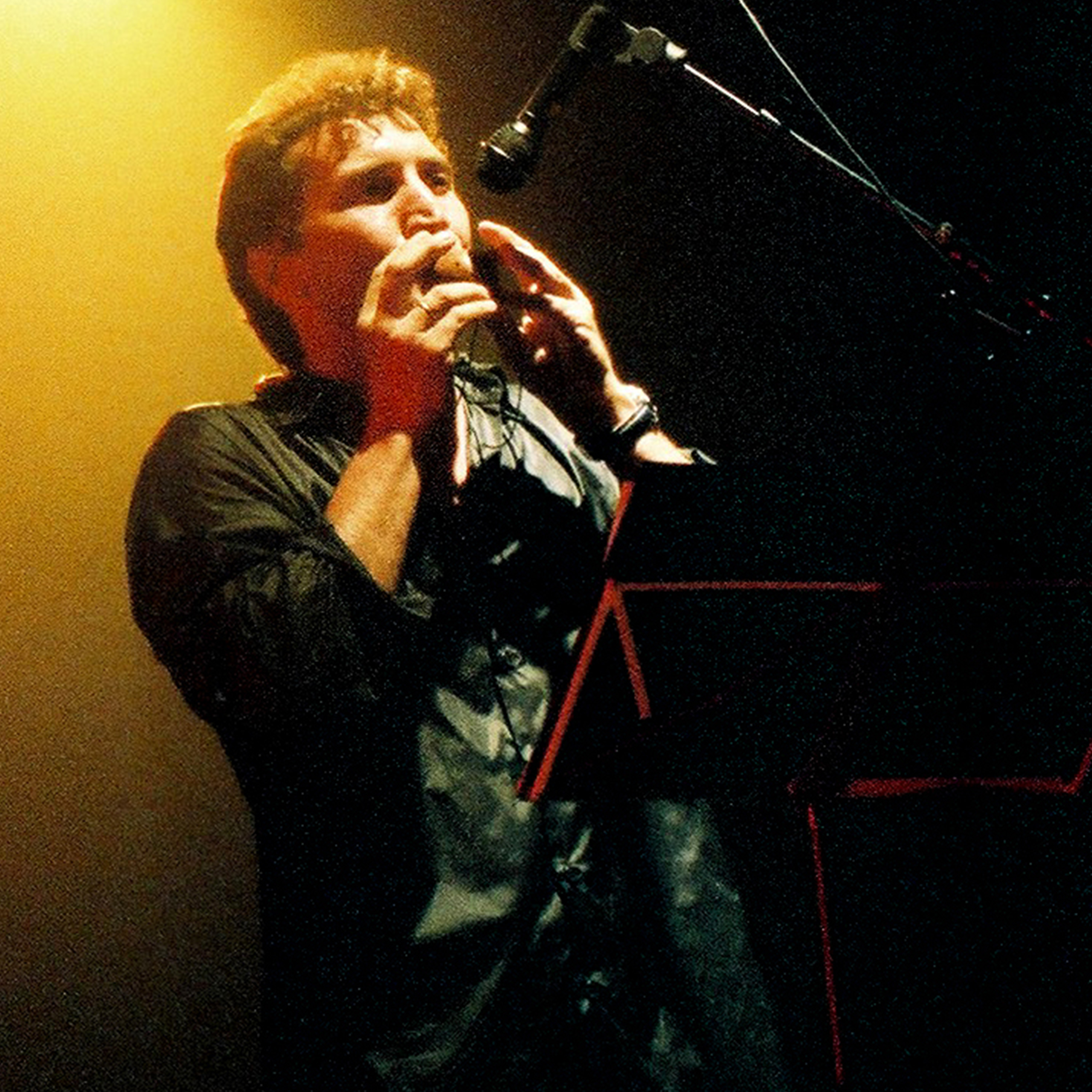 En concert